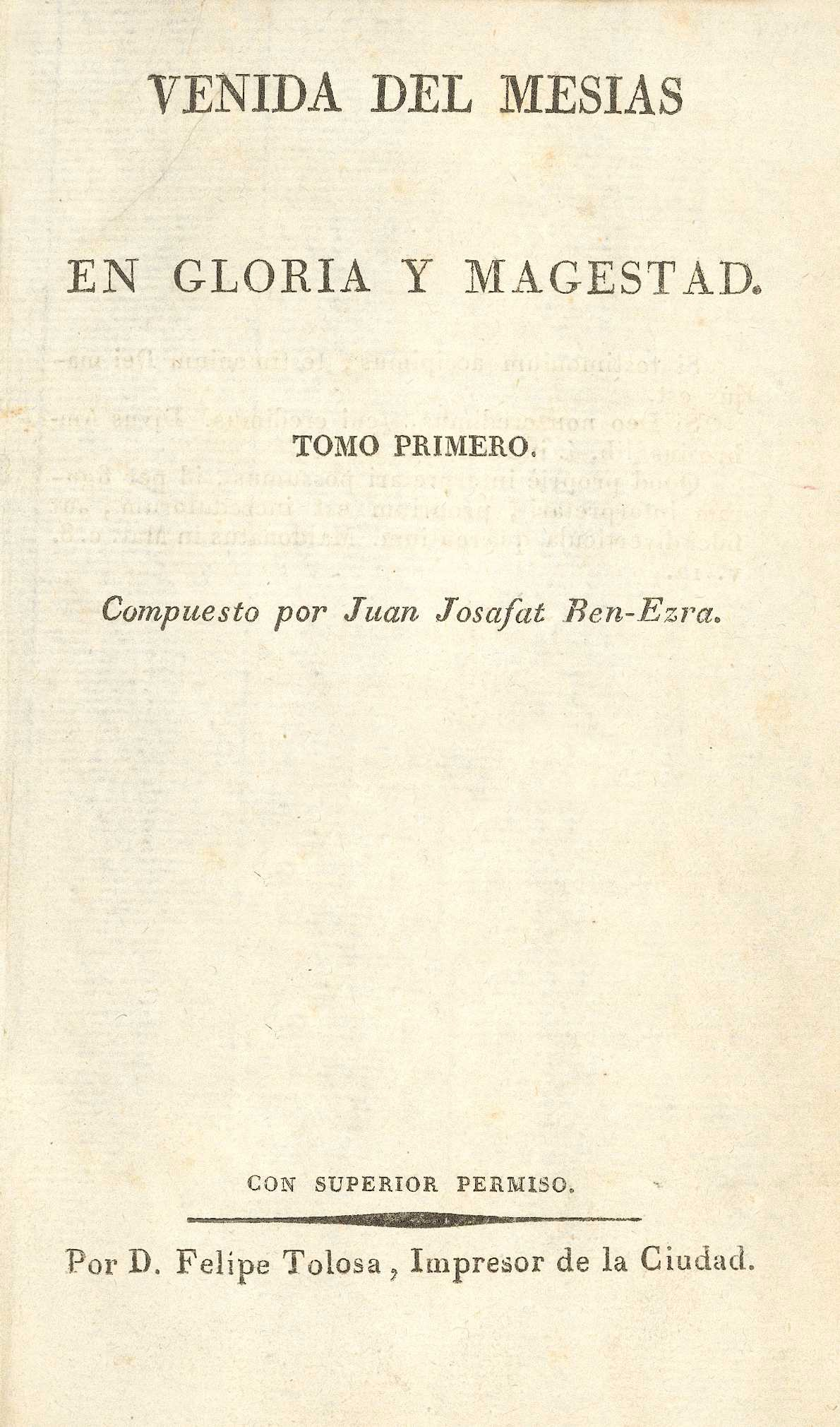 Página titular del libro Venida del Mesías en gloria y magestad del jesuita chileno Manuel Lacunza